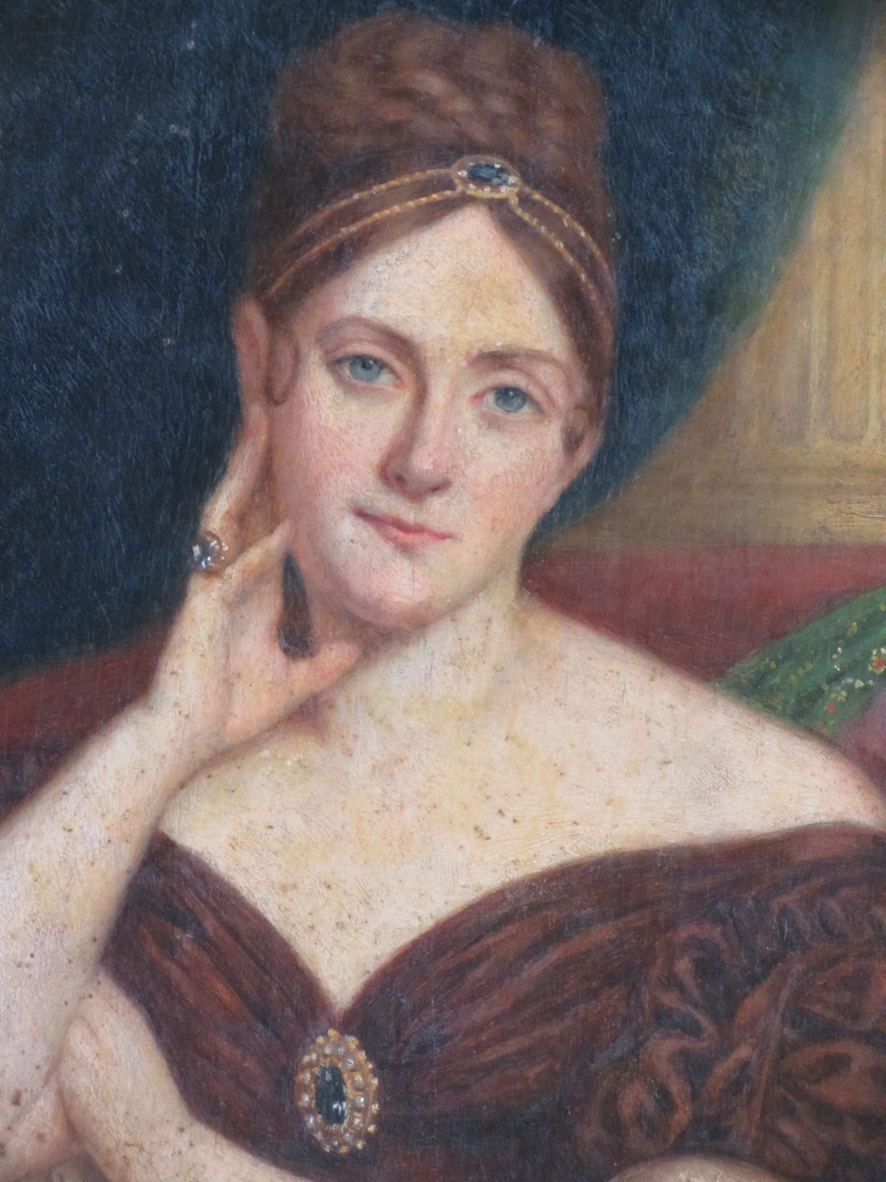 Retrato (detalle) de Isidora Zegers (Madrid, 1803 - Santiago de Chile, 1869), intérprete y compositora de música de salón